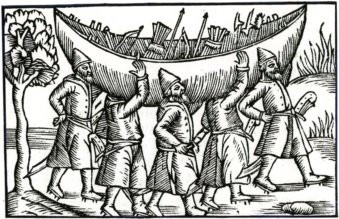 Vikings transportant leur bateau.